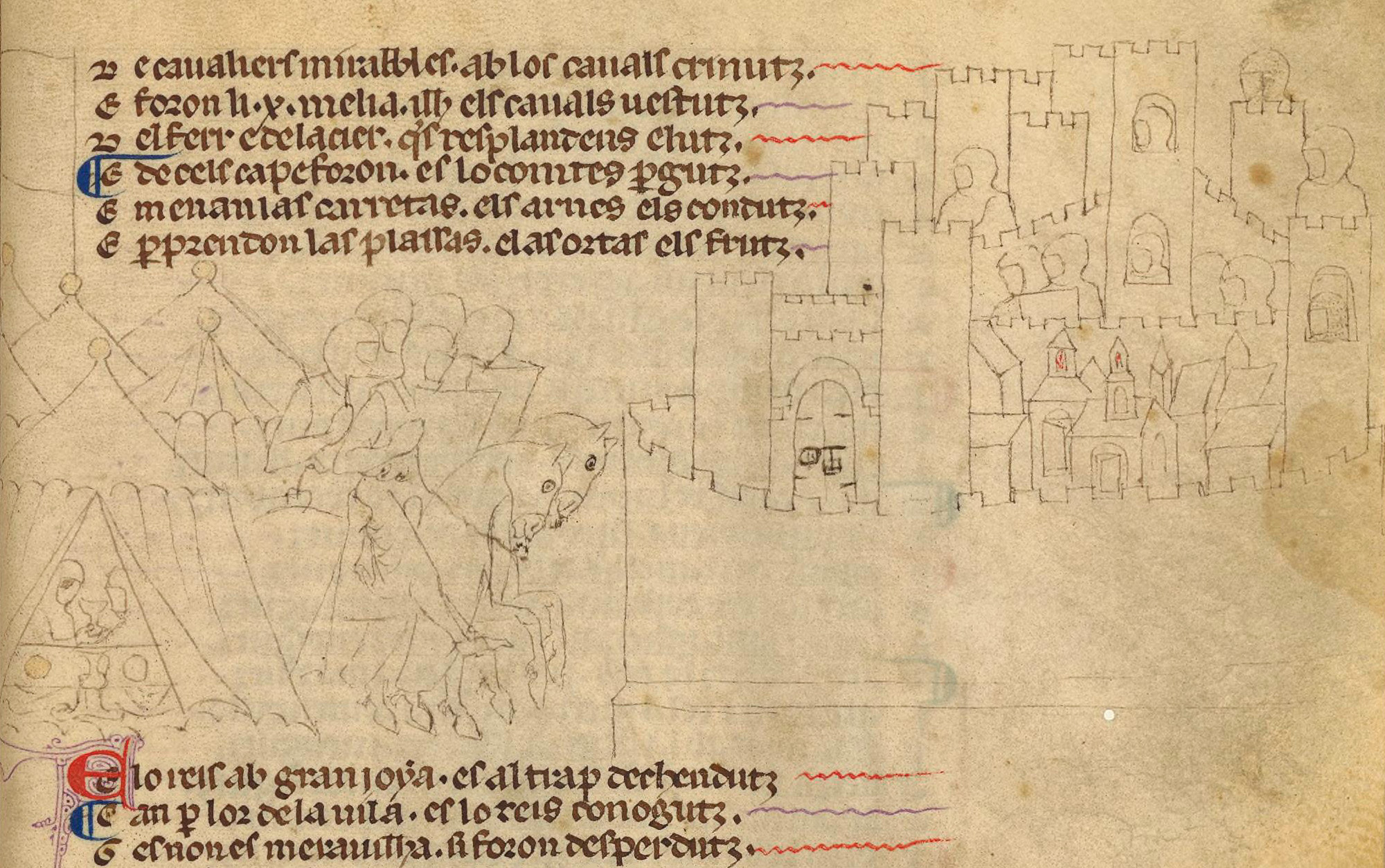 Prise de Marmande par le futur Louis VIII au cours de la Croisade des Albigeois, Guilhem de Tudèle. Manuscrit de Guillaume de Tudèle et continuateur anonyme, Chanson de la croisade des Albigeois, dessin à l'encre, France, début du XIIIe siècle , BnF, ms. Français 25425, folio 231.